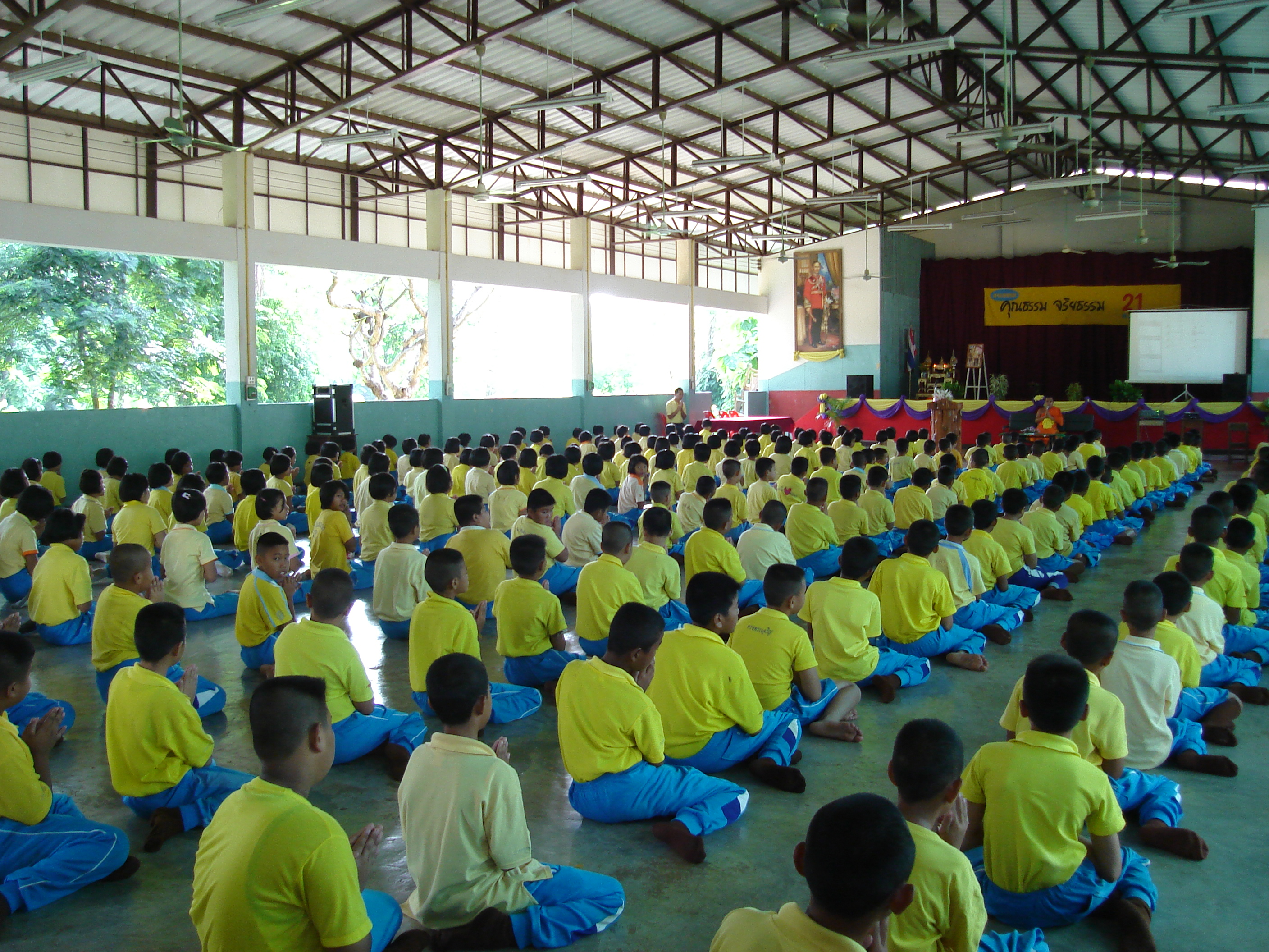 นักเรียนระดับประถมศึกษาในหอประชุมเล็ก โรงเรียนท่าปลาอนุสรณ์ อำเภอท่าปลา จังหวัดอุตรดิตถ์ level elementary education student in Thailand is payying respect to the Buddha